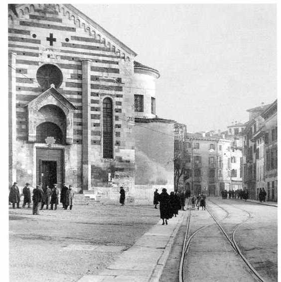 Chiesa di Santo Stefano a Verona, in una fotografia del 1934